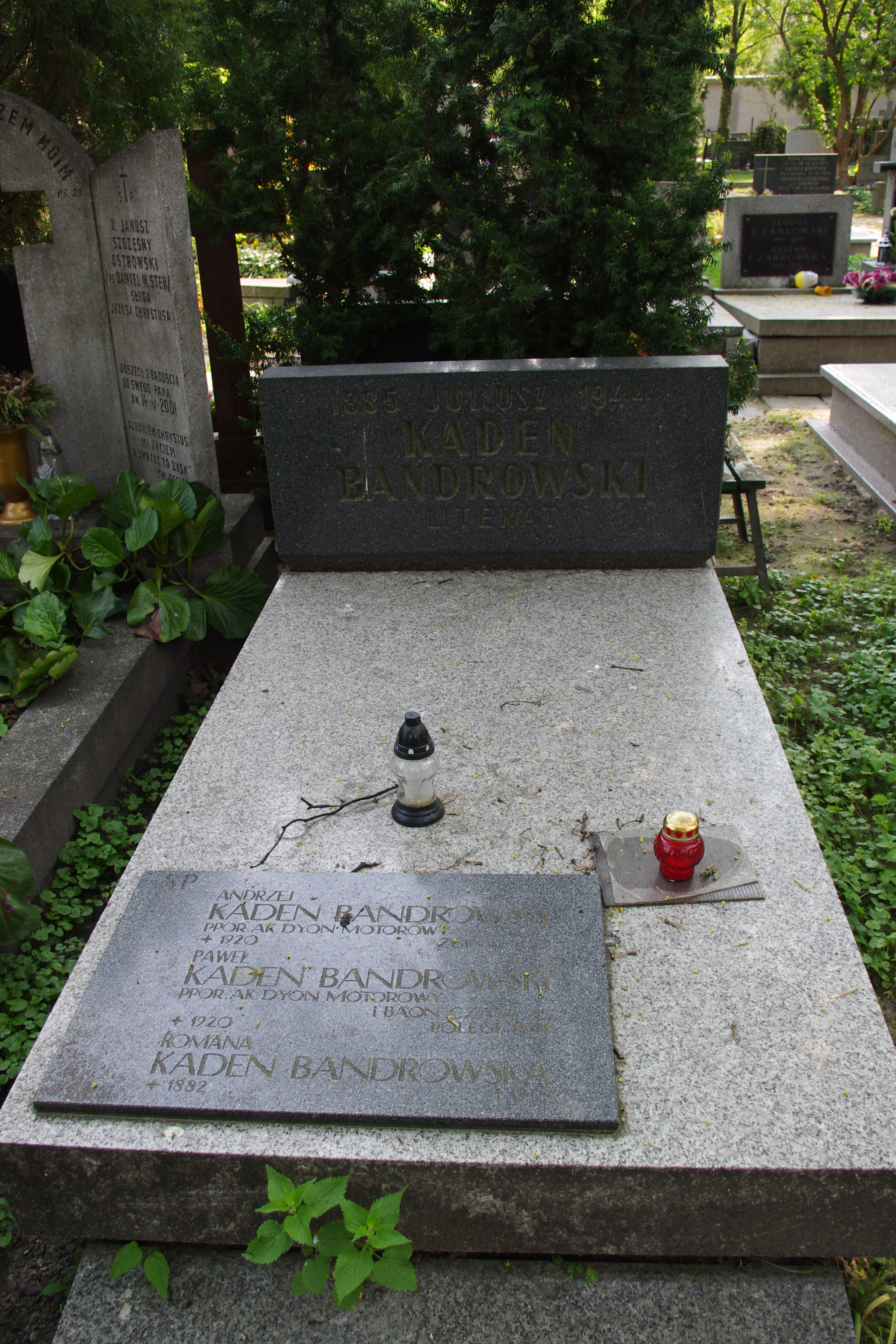 Grób pisarza Juliusza Kaden-Bandrowskiego na Cmentarzu ewangelicko-reformowanym w Warszawie